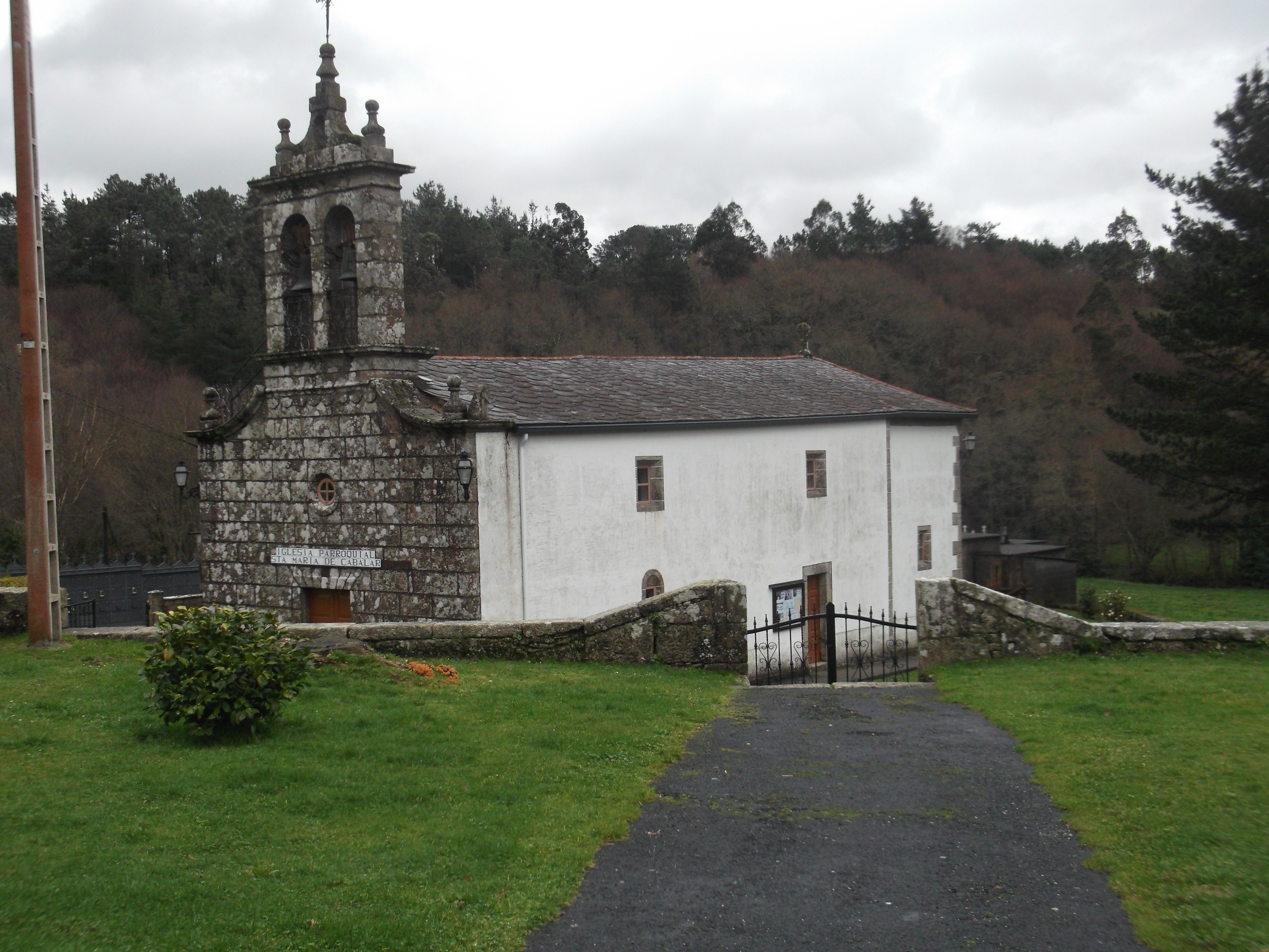 Igrexa de Santa María de Cabalar.